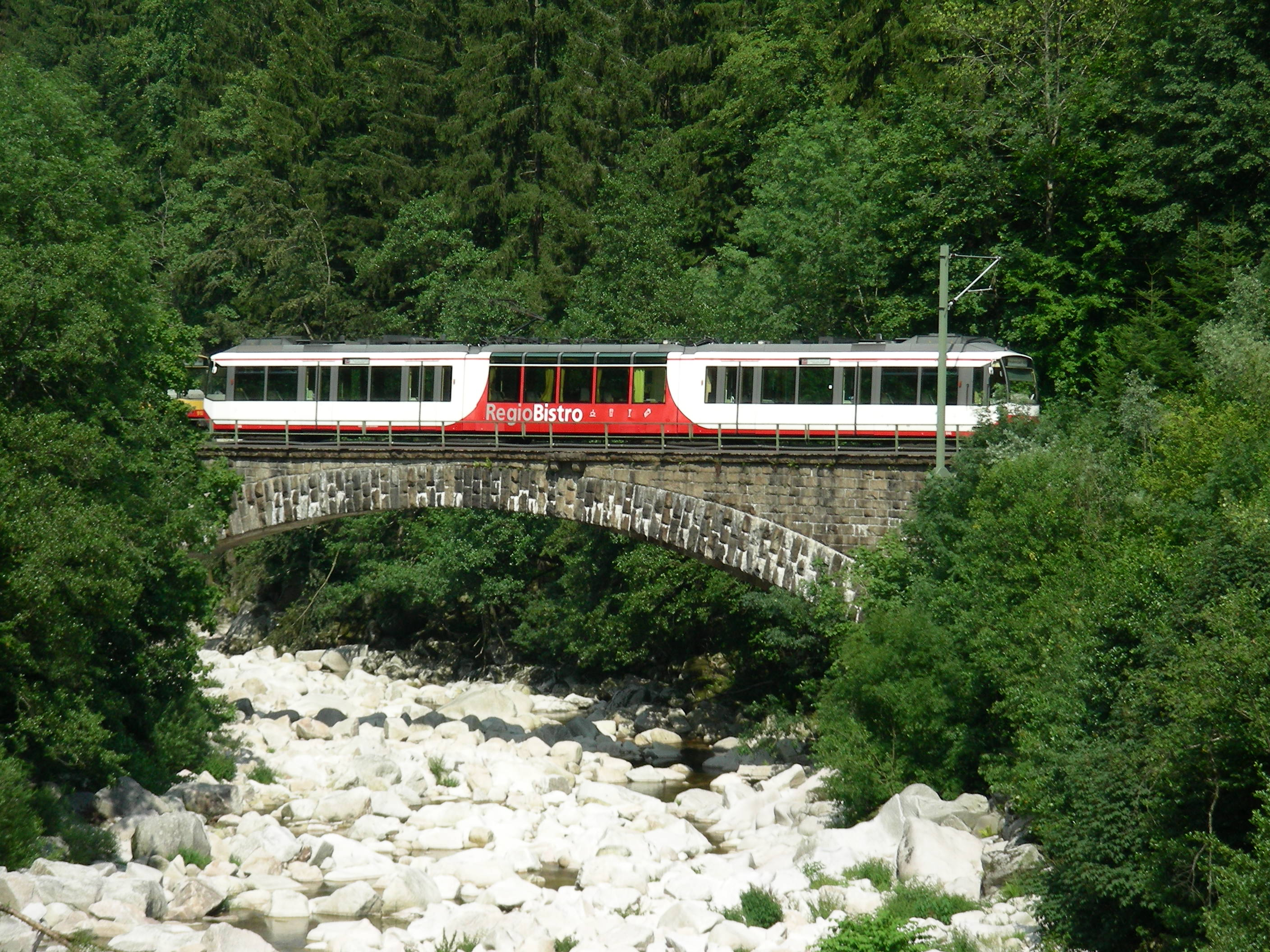 Stadtbahn auf der Murgbrücke bei Raumünzach auf der Murgtalbahn